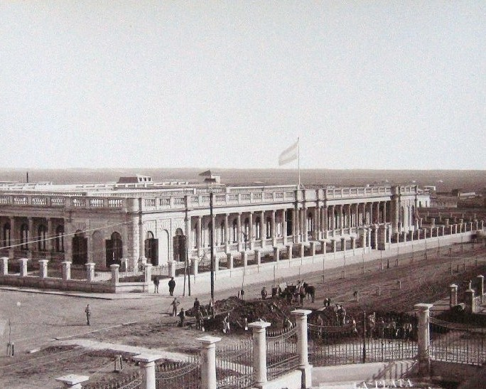 Edificio del Ministerio de Economía de La Plata